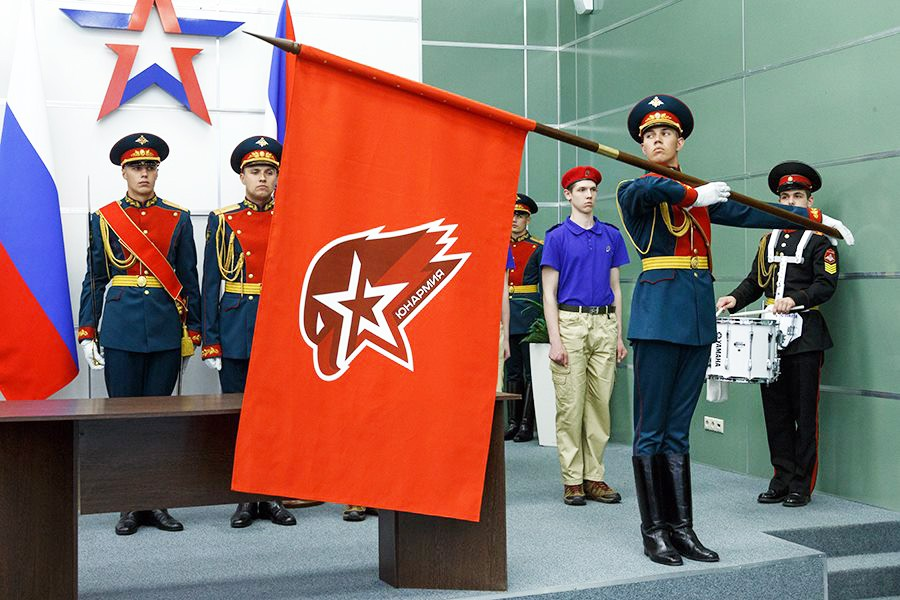 1-й слёт всероссийского военно-патриотического общественного движения «Юнармия» в парке «Патриот». Флаг всероссийского военно-патриотического общественного движения «Юнармия»